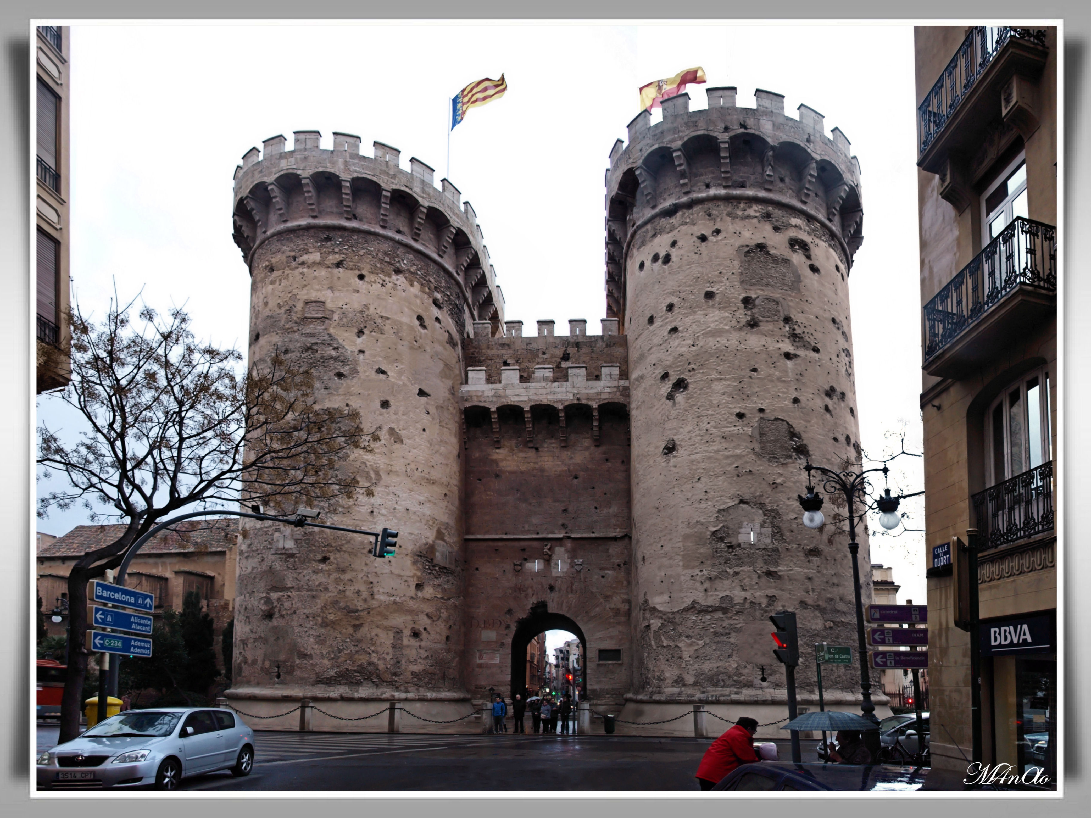 Torres de Quart parte de los restos de la antigua muralla medieval que cercaba Valencia